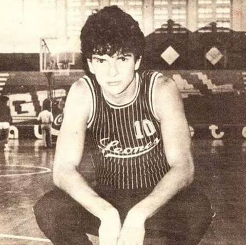 Ricardo Arjona en su etapa de baloncestista.